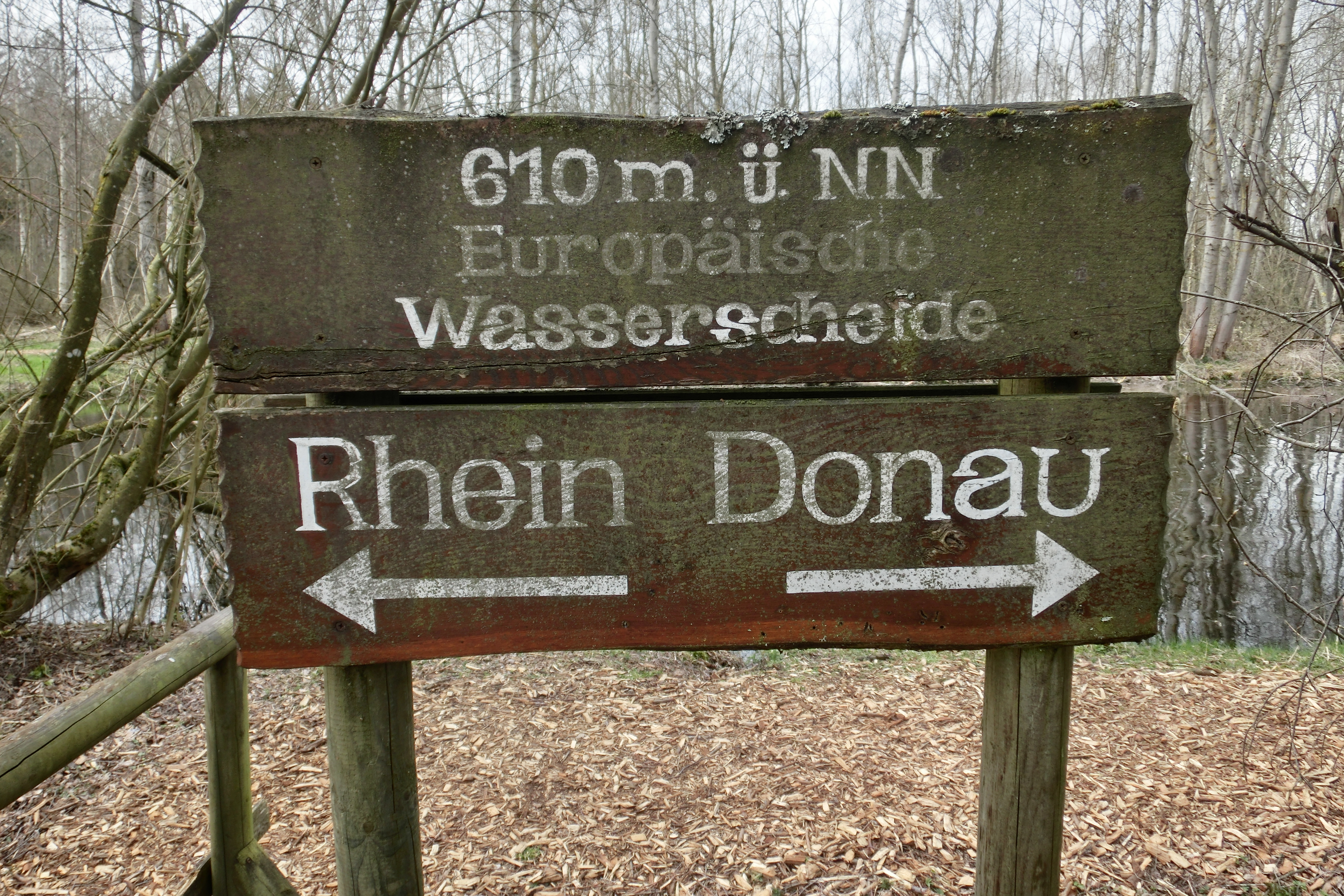 Deutschland - Baden-Württemberg - Landkreis Ravensburg - Wilhelmsdorf, im Pfrunger-Burgweiler Ried: Hinweisschild "610 m. ü. NN, Europäische Wasserscheide Rhein/Donau"